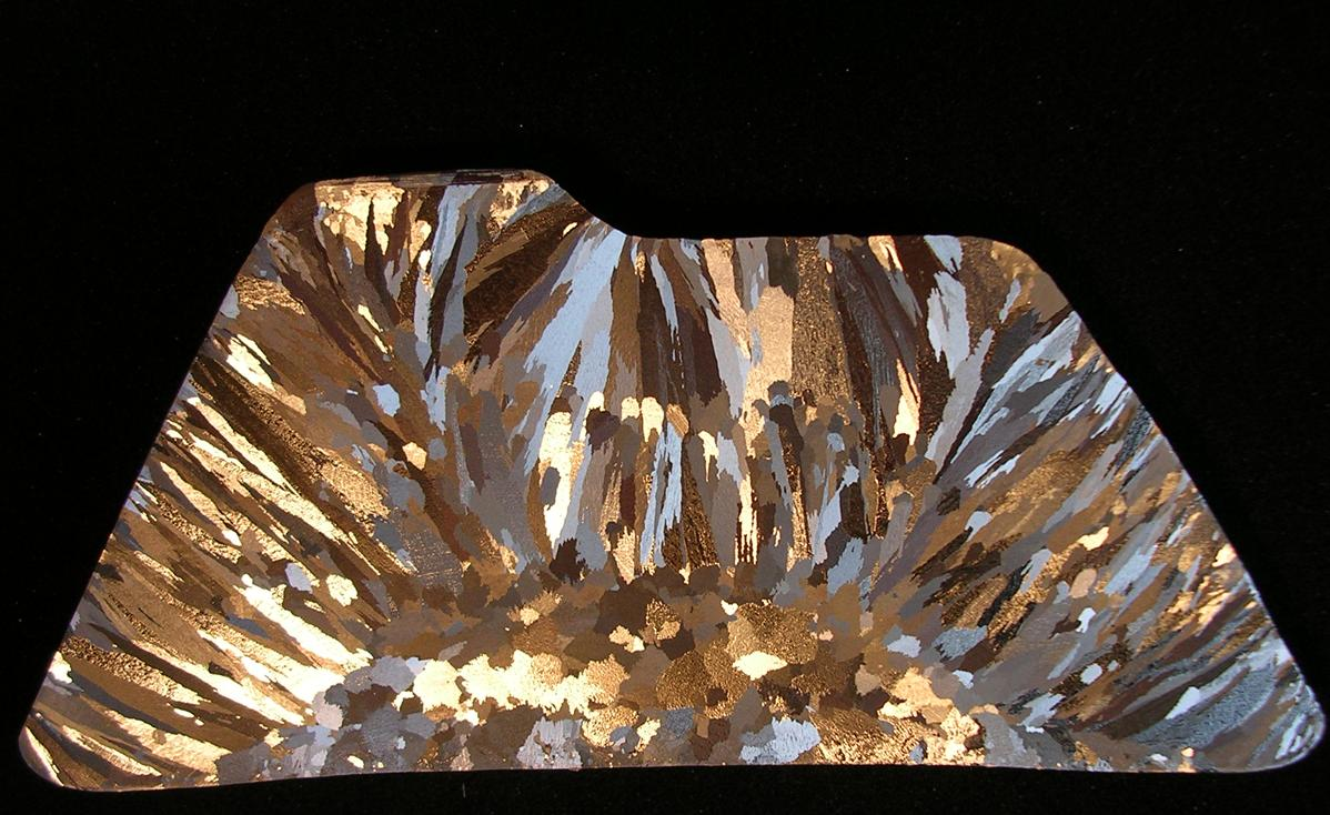 Mikrogeätzter, hochreiner (99.99%) Aluminiumbarren (Bild: Alexander C. Wimmer) matt glänzend